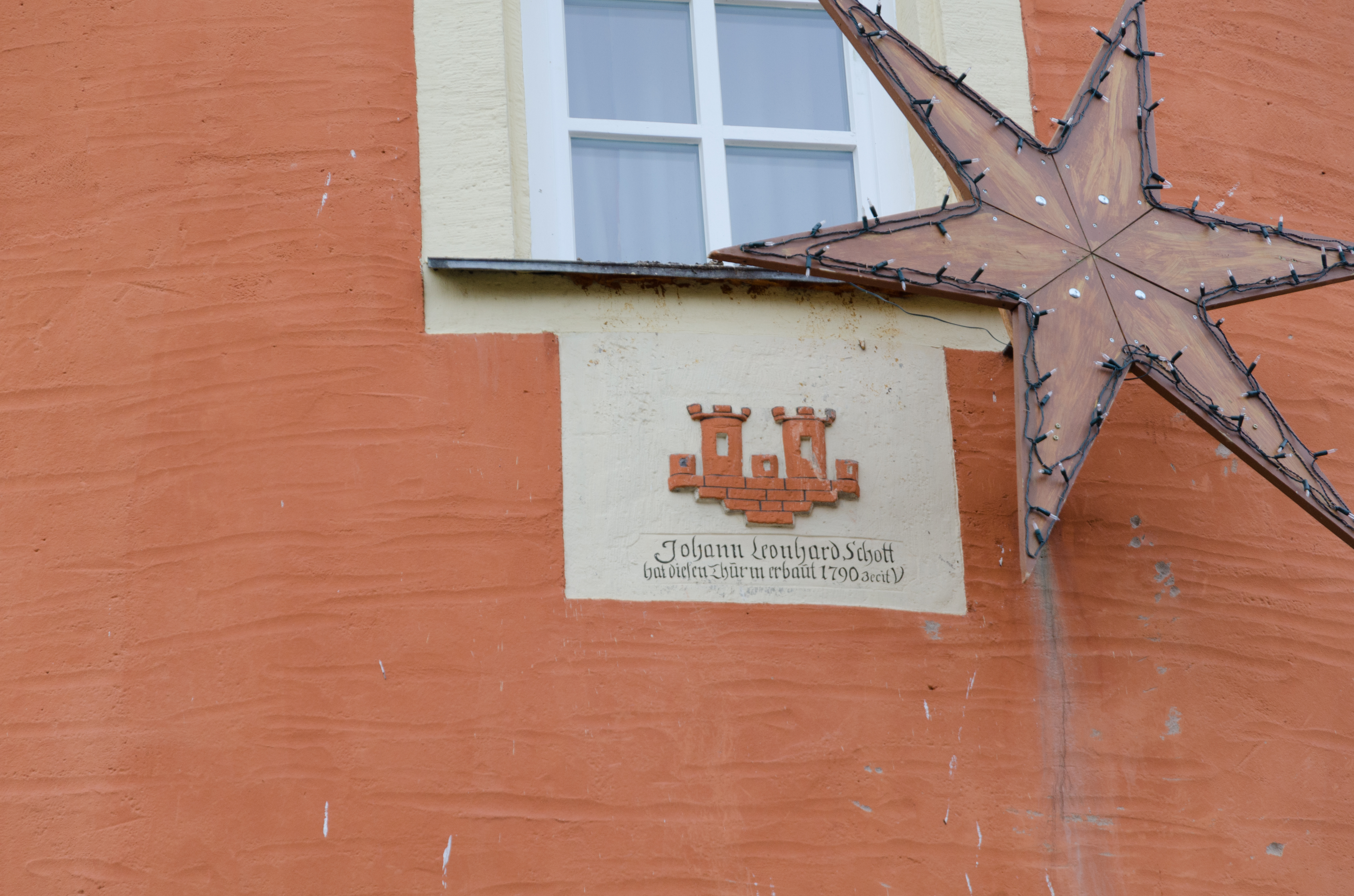 Neustett, Ehem. Ölmühle